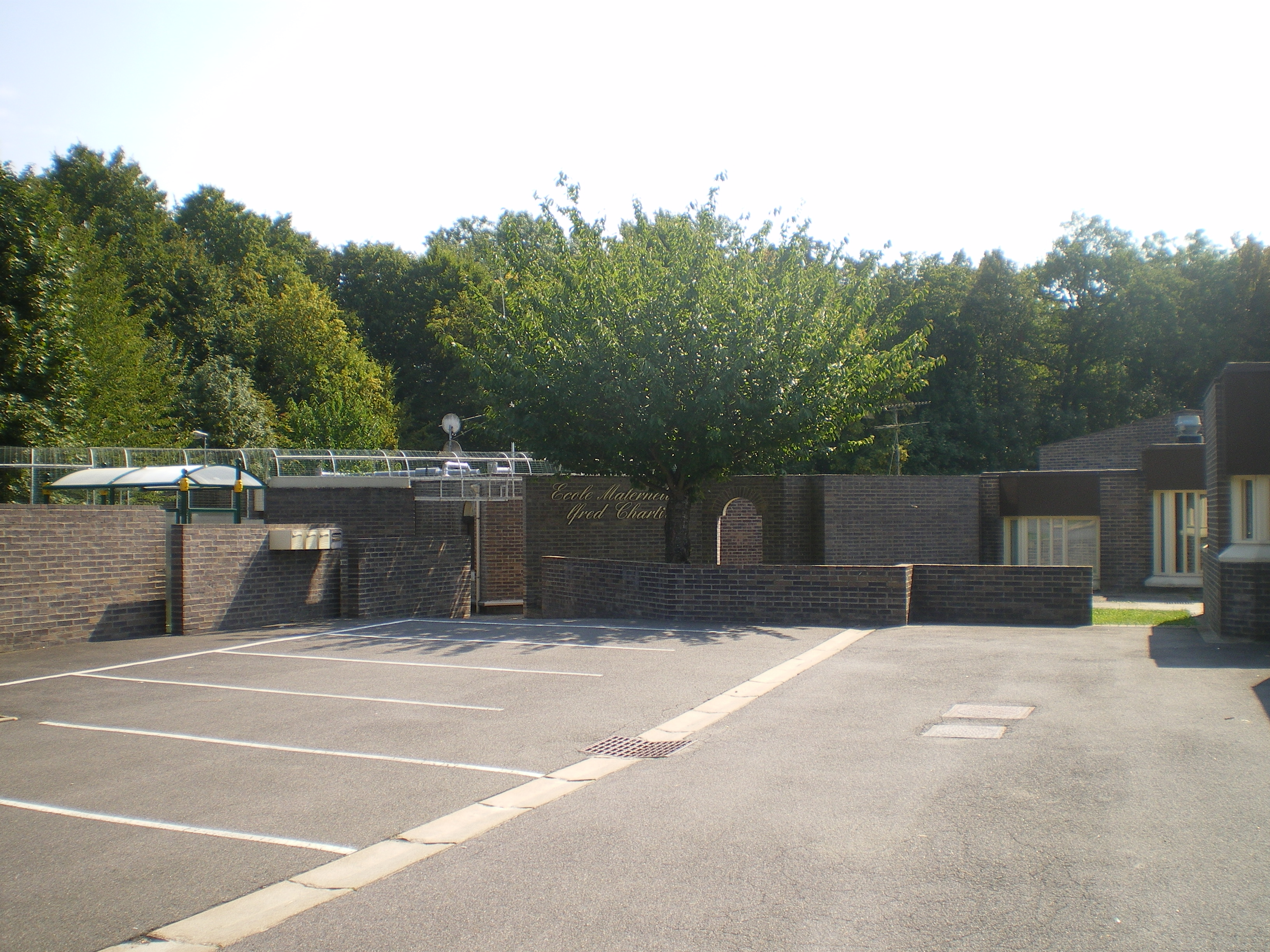 Ecole Maternelle Alfred Chartier